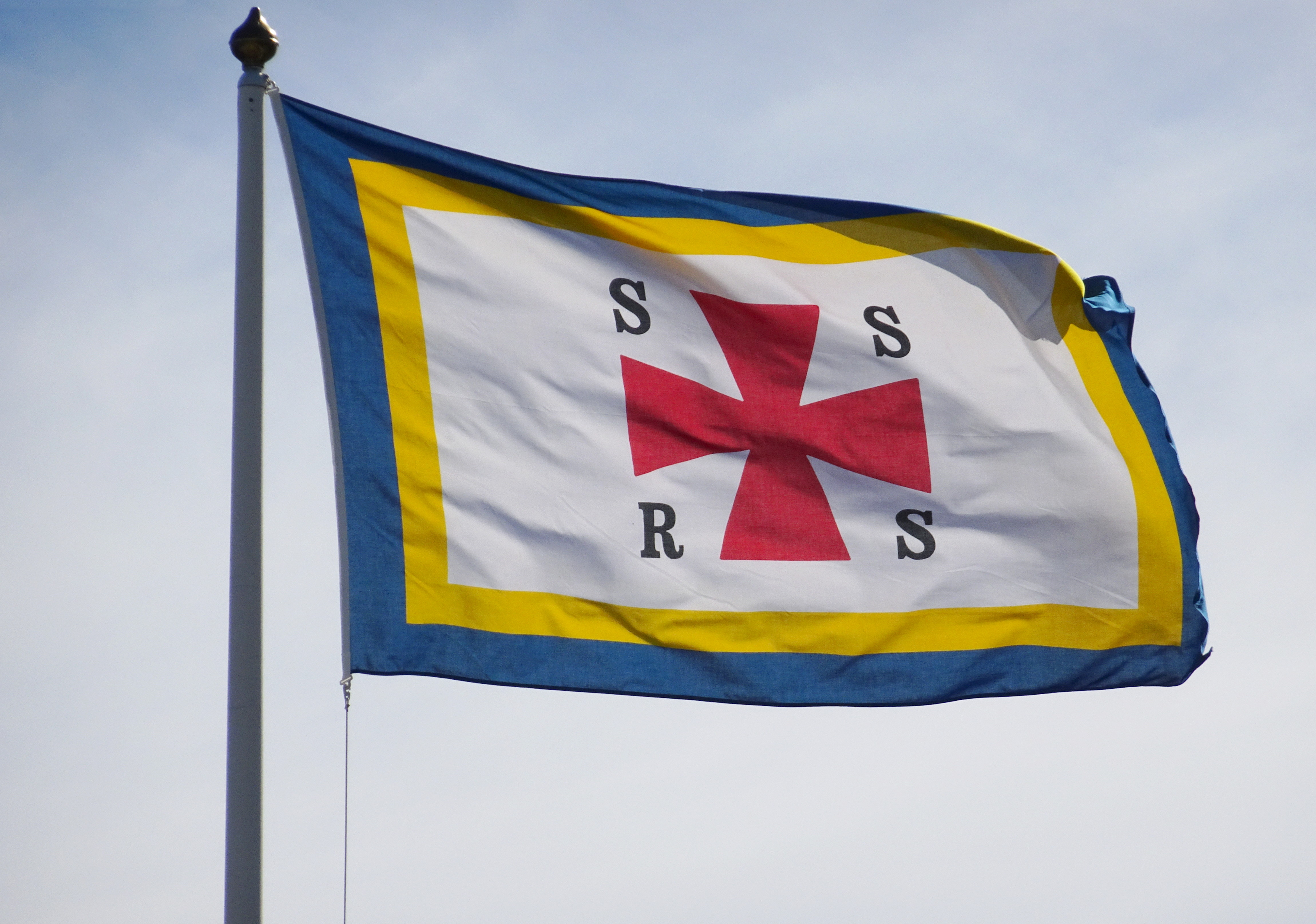 Sjöräddningssällskapets flagga